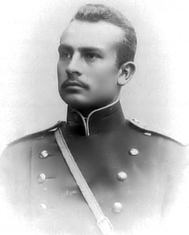 Arvo Gustav Alexander Södermann